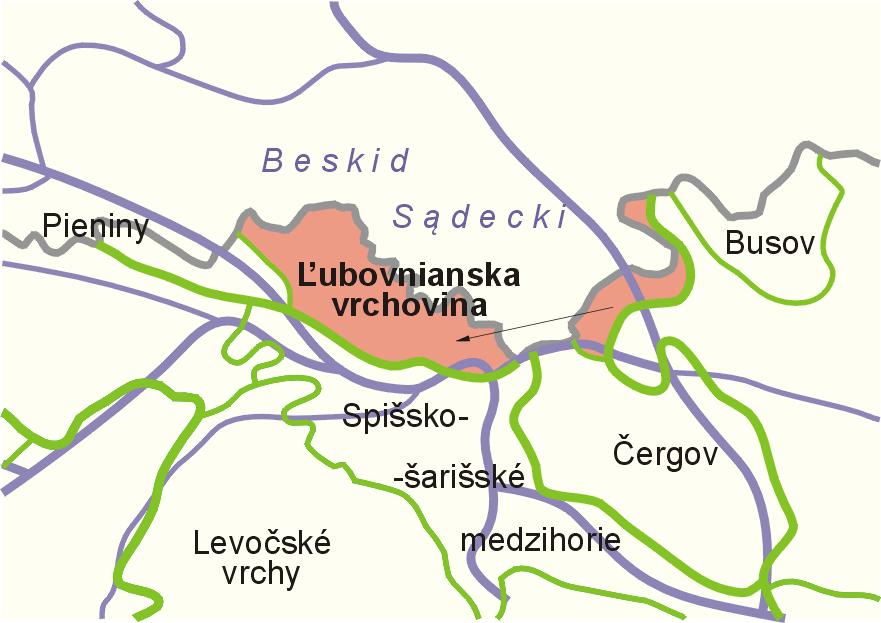 Ľubovnianska vrchovina na tle podziału regionalnego słowackiego (linie zielone) i polskiego (linie fioletowe)